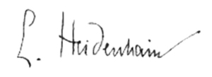 Unterschrift von Lothar Heidenhain, aus der „Galerie hervorragender Ärzte und Naturforscher“ (Beilage zur Münchner medizinischen Wochenschrift)